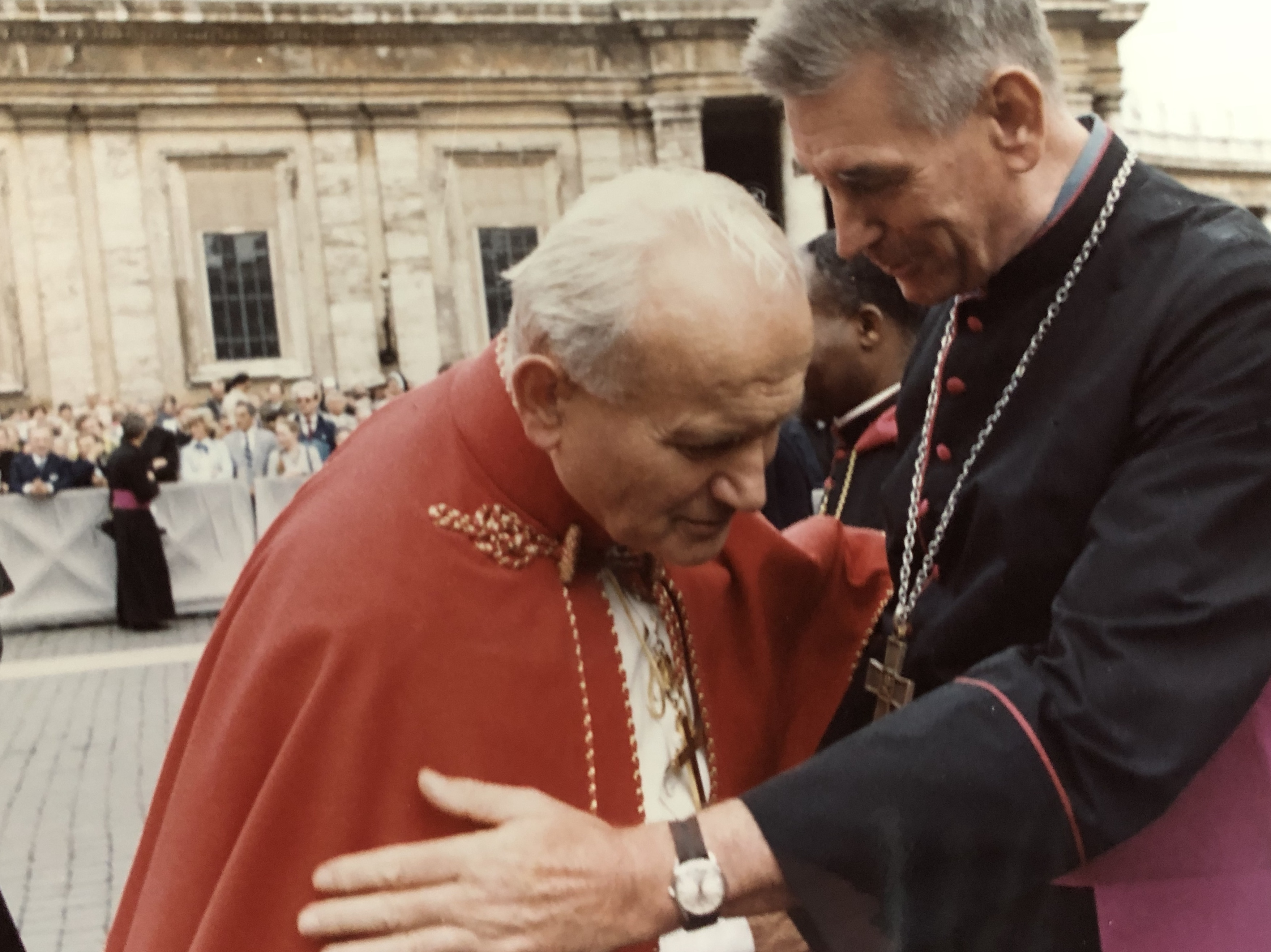 Mons. Pedro Shaw junto a San Juan Pablo II